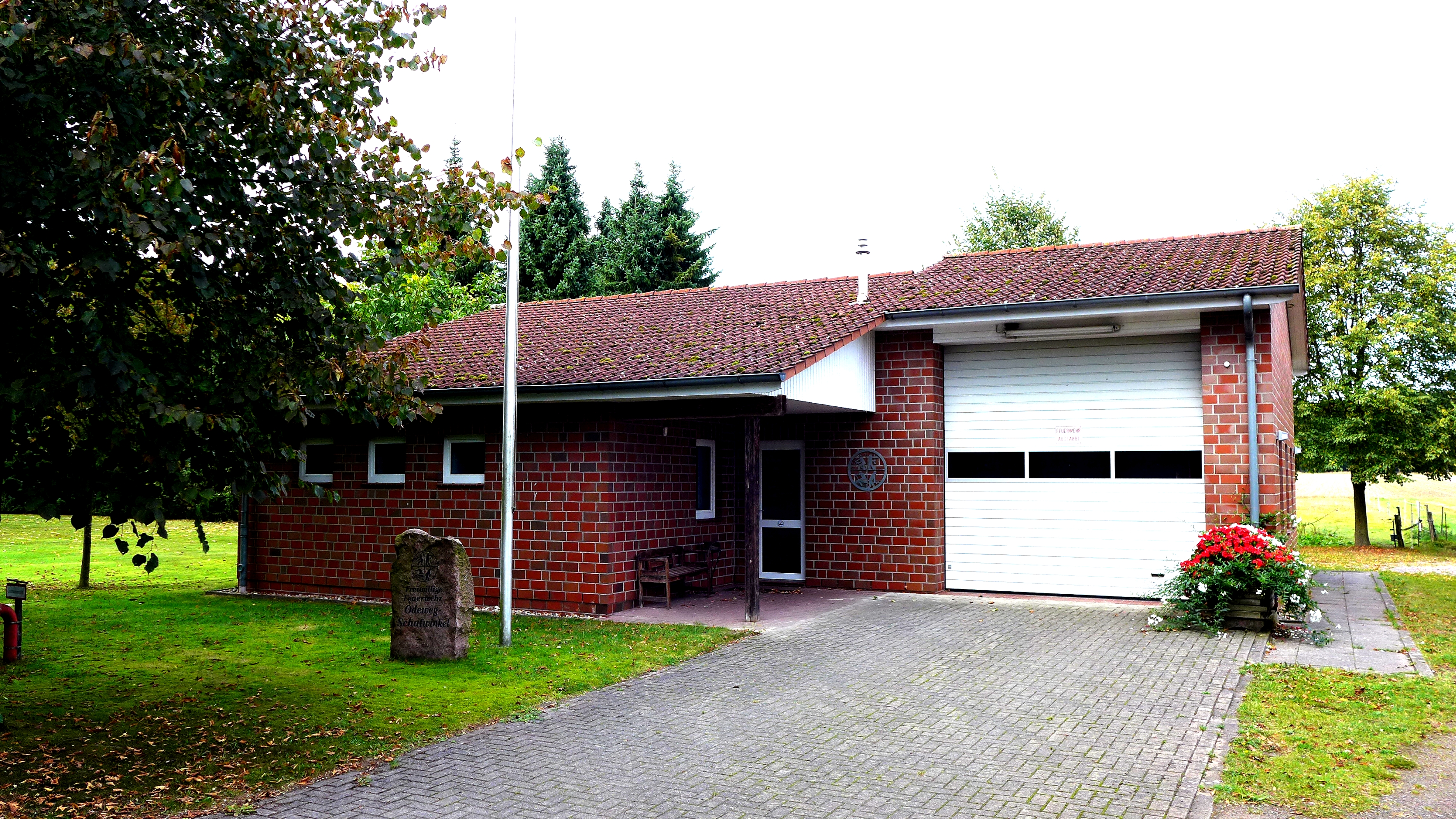 Neues Gerätehaus der Freiwillige Feuerwehr Odeweg-Schafwinkel. Aufnahmedatum 2016-10. Das Dorf Odeweg wurde 1144 erstmals urkundlich erwähnt. Odeweg und Schafwinkel sind der Gemeinde Kirchlinteln zugehörig.